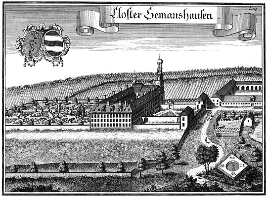 Kloster Seemannshausen Augustiner Gangkofen, Kupferstich 1710